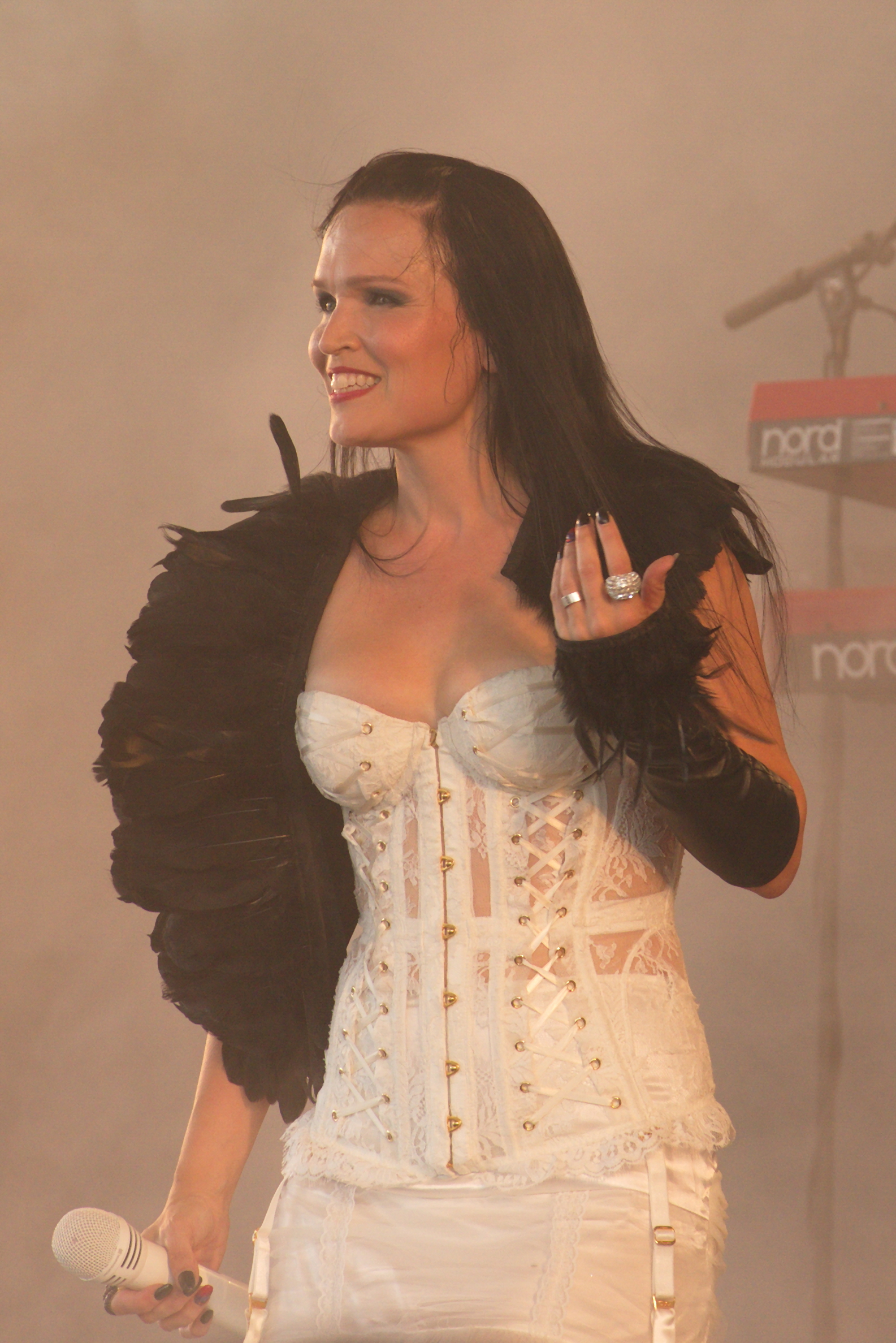 Tarja, Amphi festival 2016